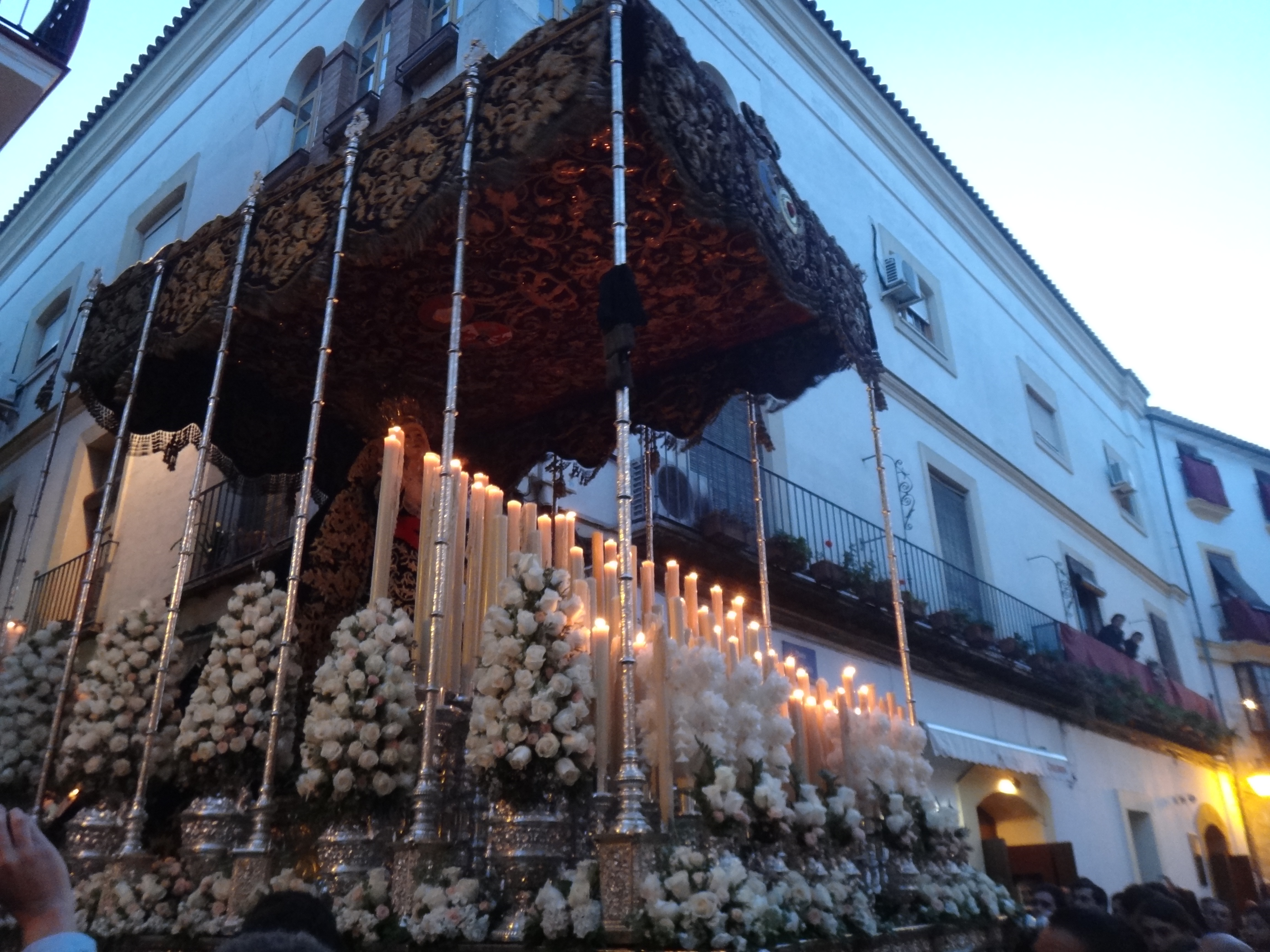 El Mayor Dolor. Semana Santa de Jerez de la Frontera 2015 (Andalucía, España)